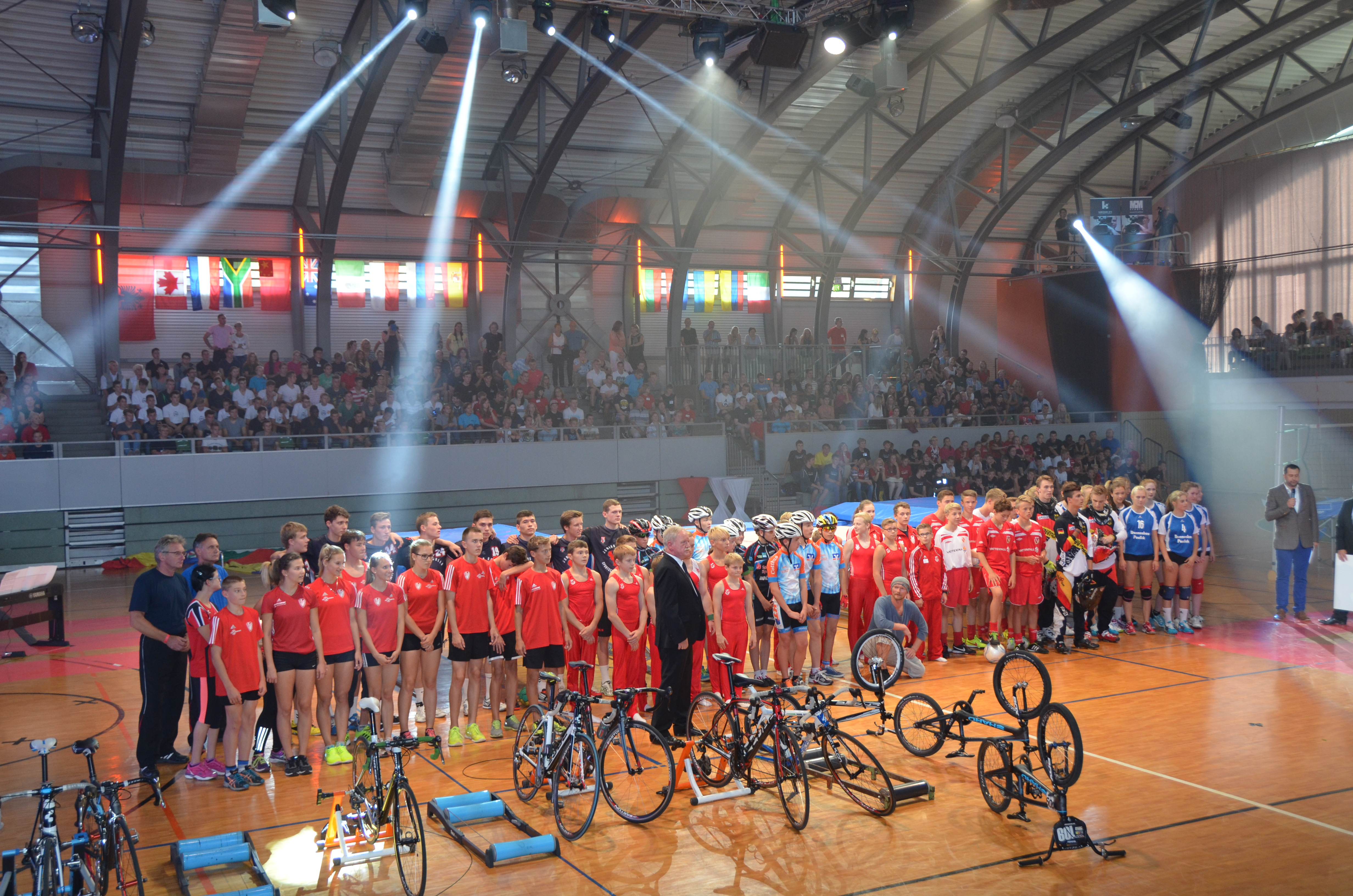 60 Jahre Lausitzer Sportschule Cottbus, Feier in der Lausitz-Arena The making of this document was supported by the Community-Budget of Wikimedia Germany.